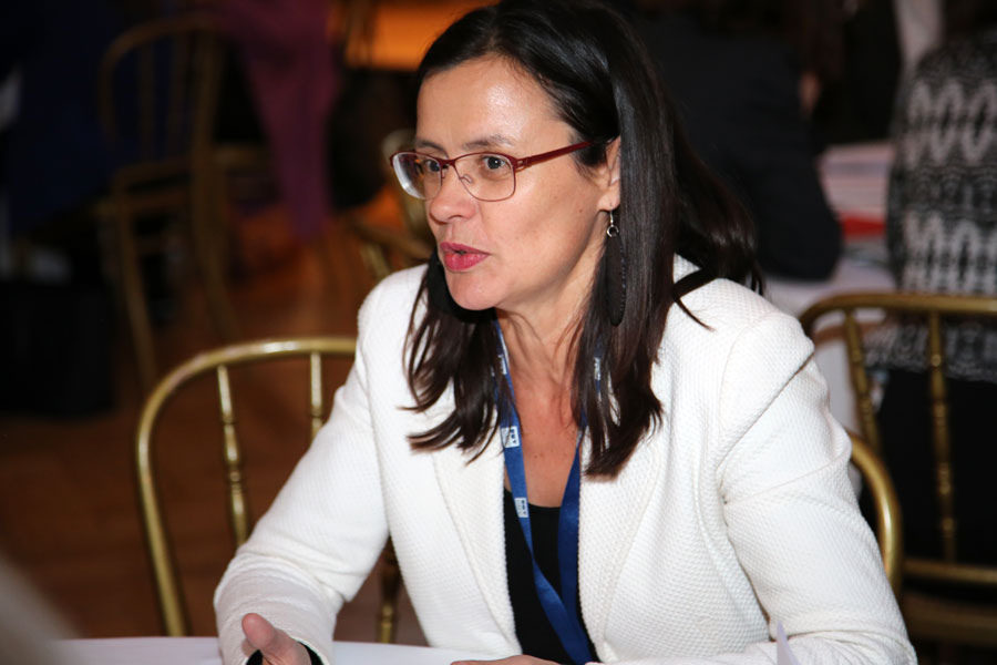 Esther Mitterstieler-8379